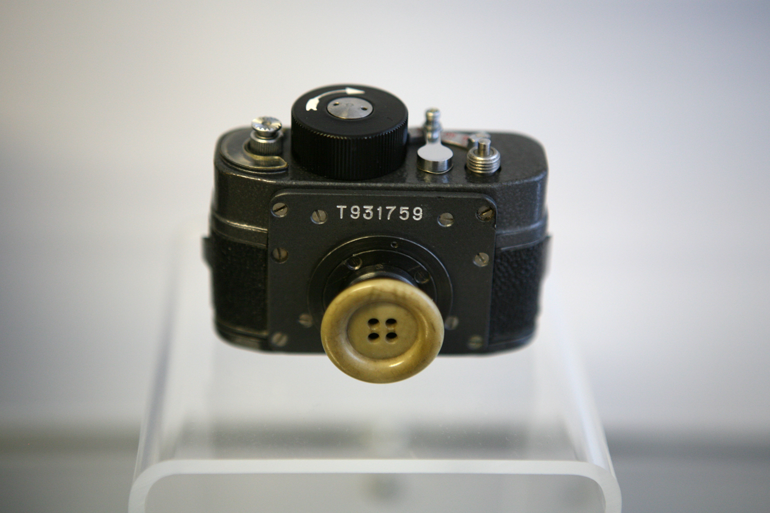 Knopflochkamera: Die Kamera befand sich in der Kleidung. Zur Tarnung wurde auf des Objektiv ein passender Knopf geschraubt.